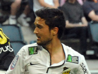 Leonard Zuta